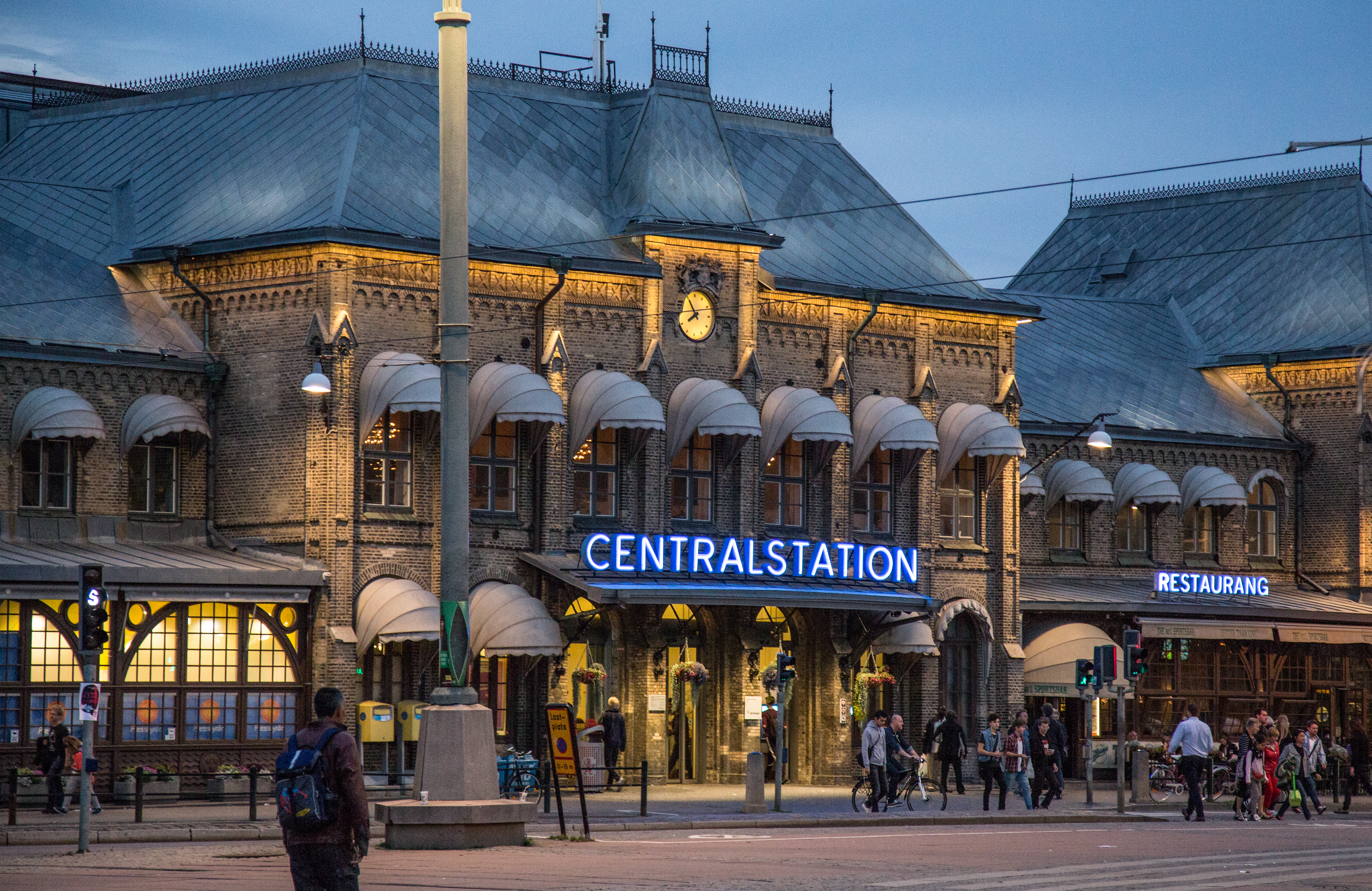 Göteborg C